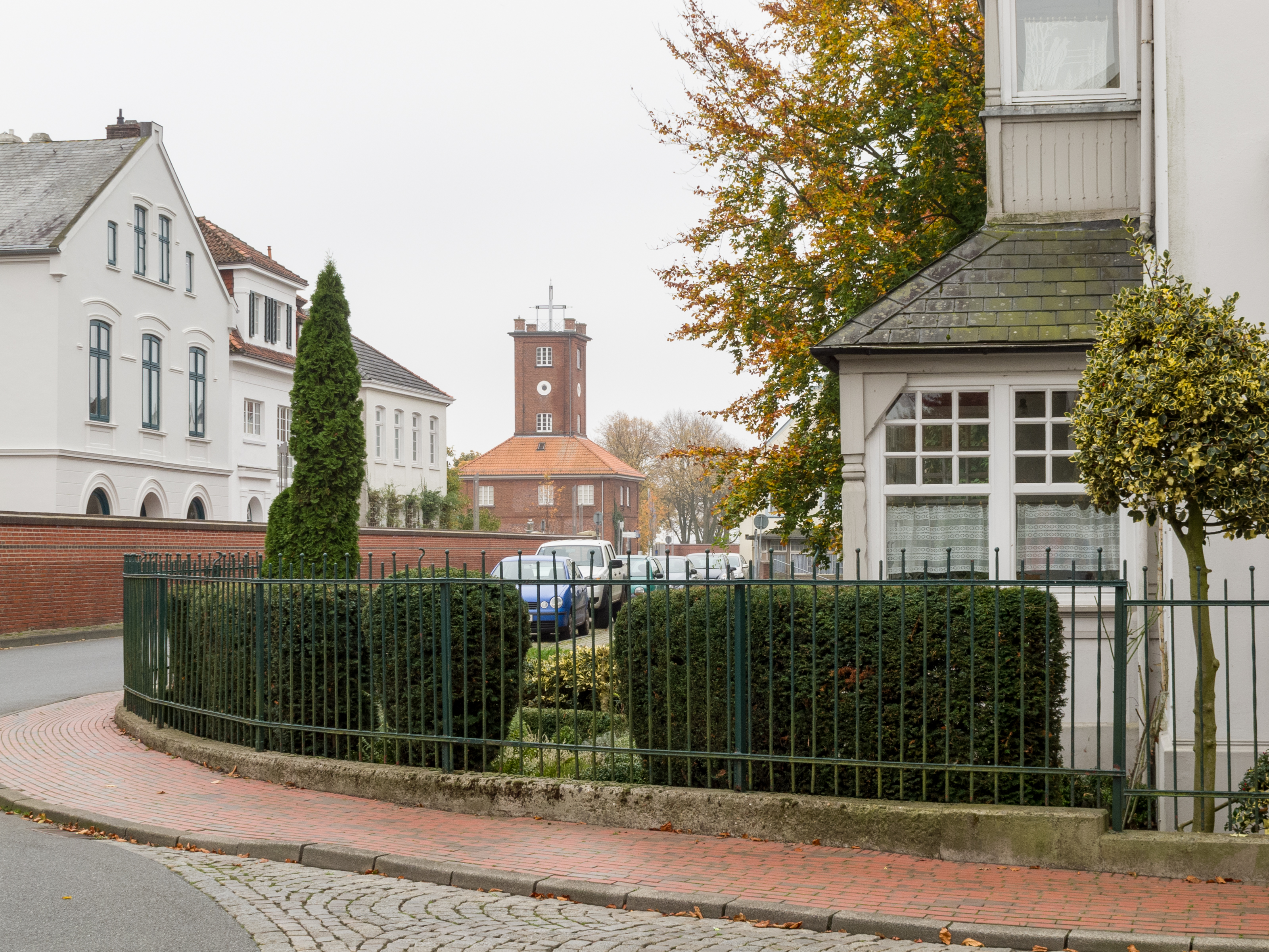 Bürgerhäuser an der Mitteldeichstrasse, Hochwasserschutzmauer und der Optische Telegraph im Hintergrund